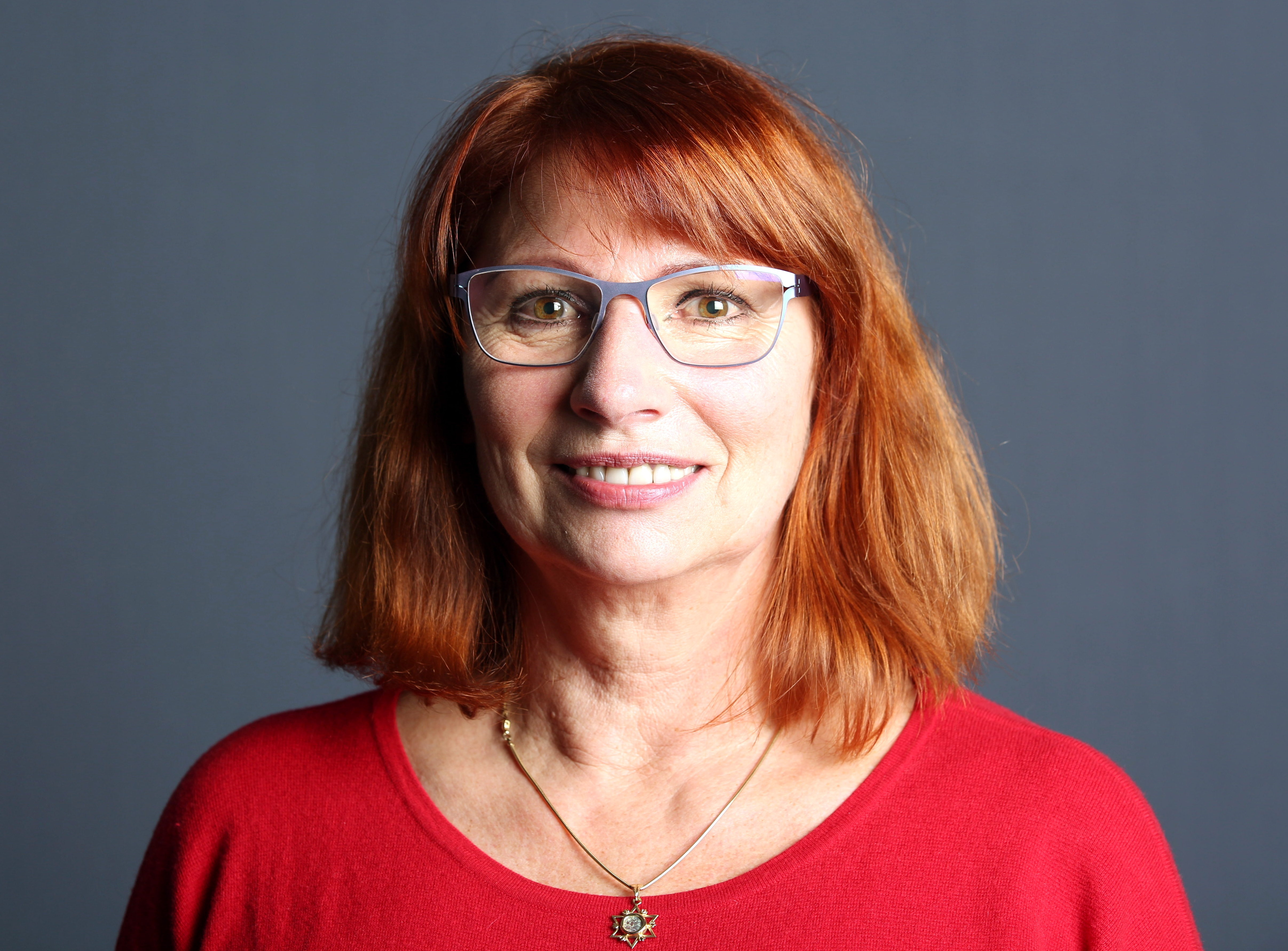 Petra Köpping (SPD)